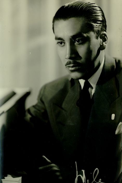 Vicente Bianchi, Buenos Aires, 194-. Foto de Estudio Wilenski